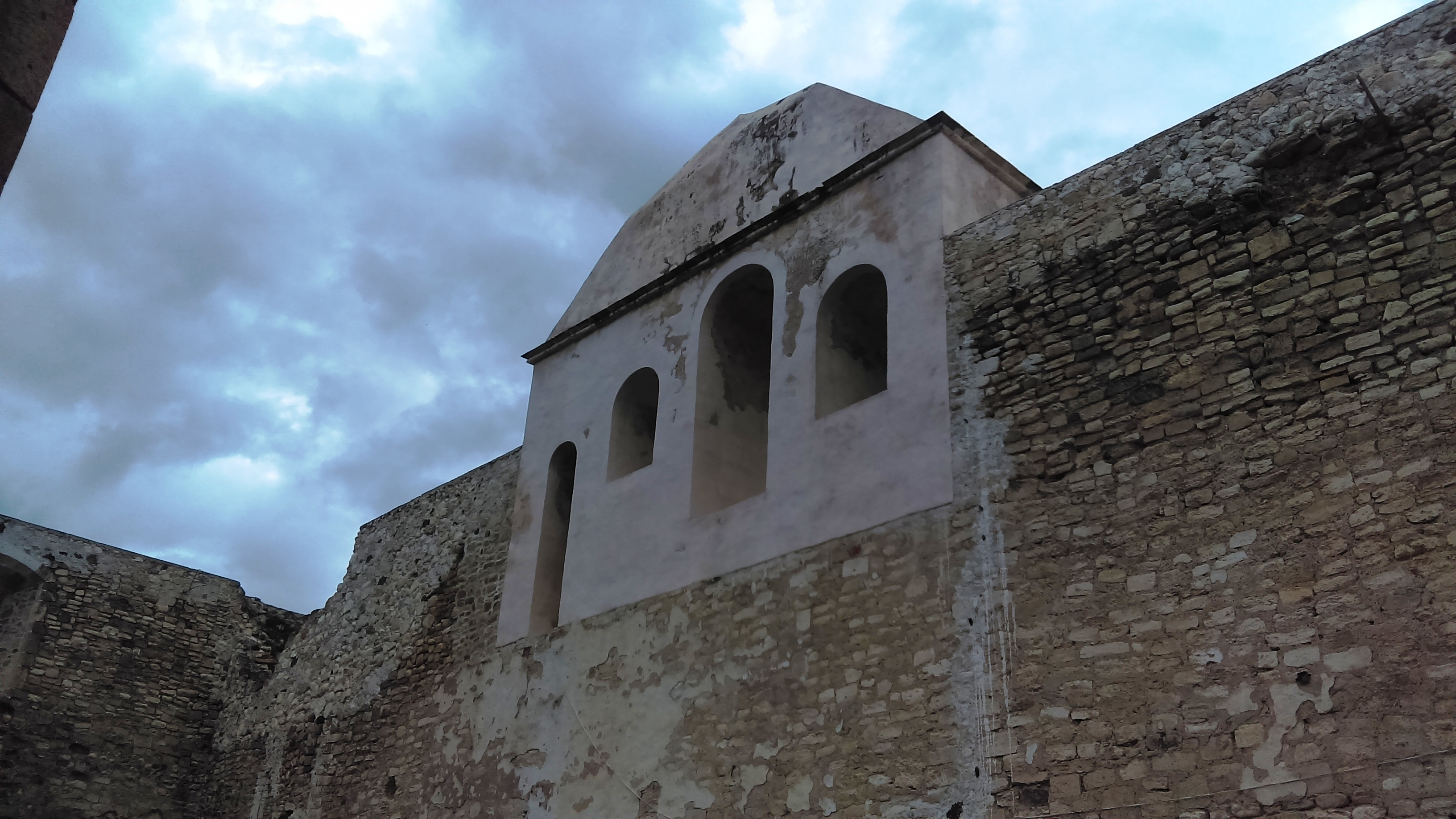 Edifico La Comunidad en Metztitlán, Hidalgo, México.